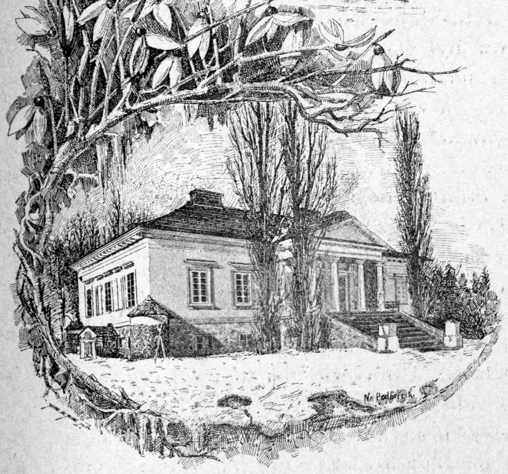 Беларуская (тарашкевіца): Кушляны (Kušlany), сядзіба Сулістроўскіх (Sulistroŭski) і Шафнагеляў